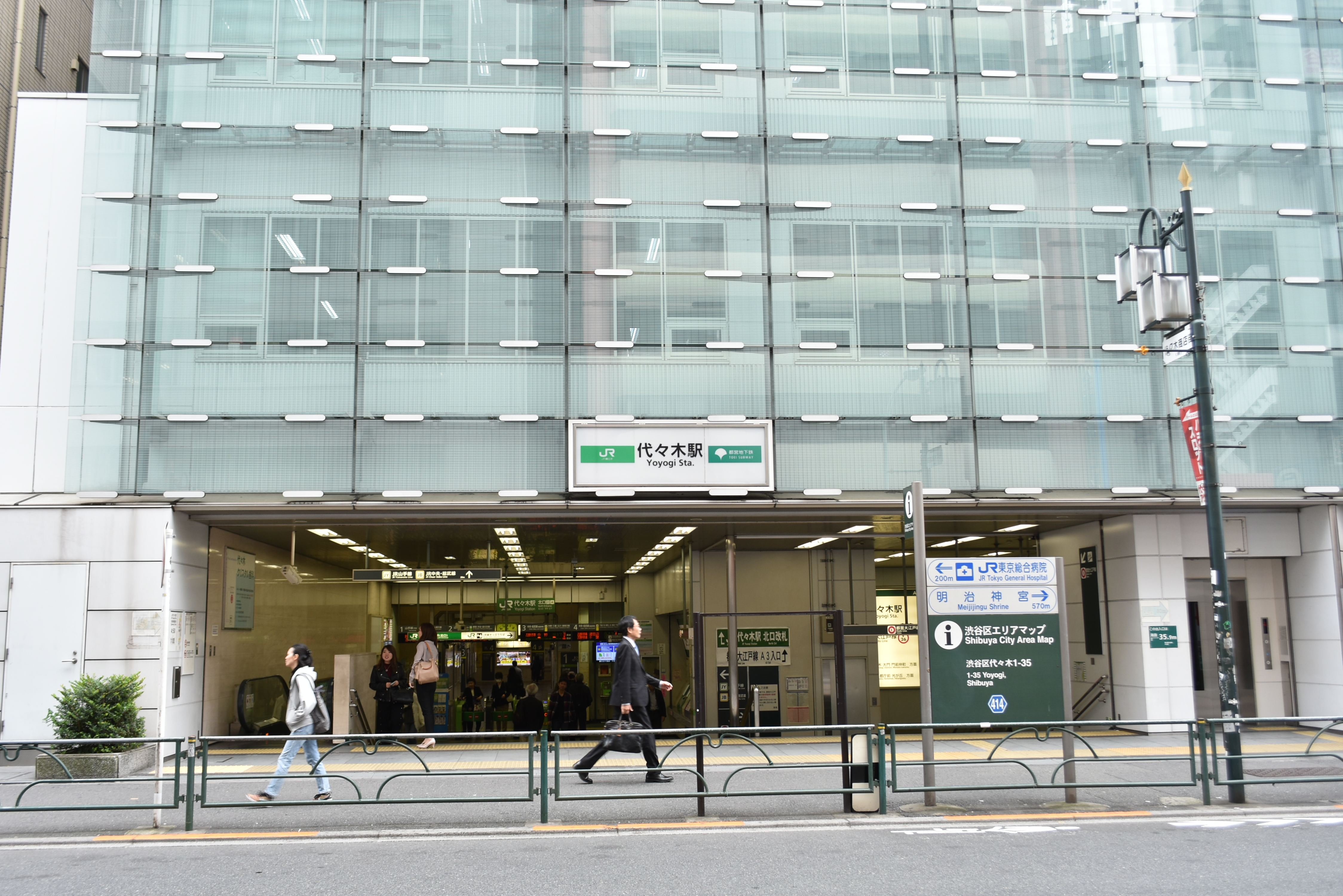 代々木駅入口